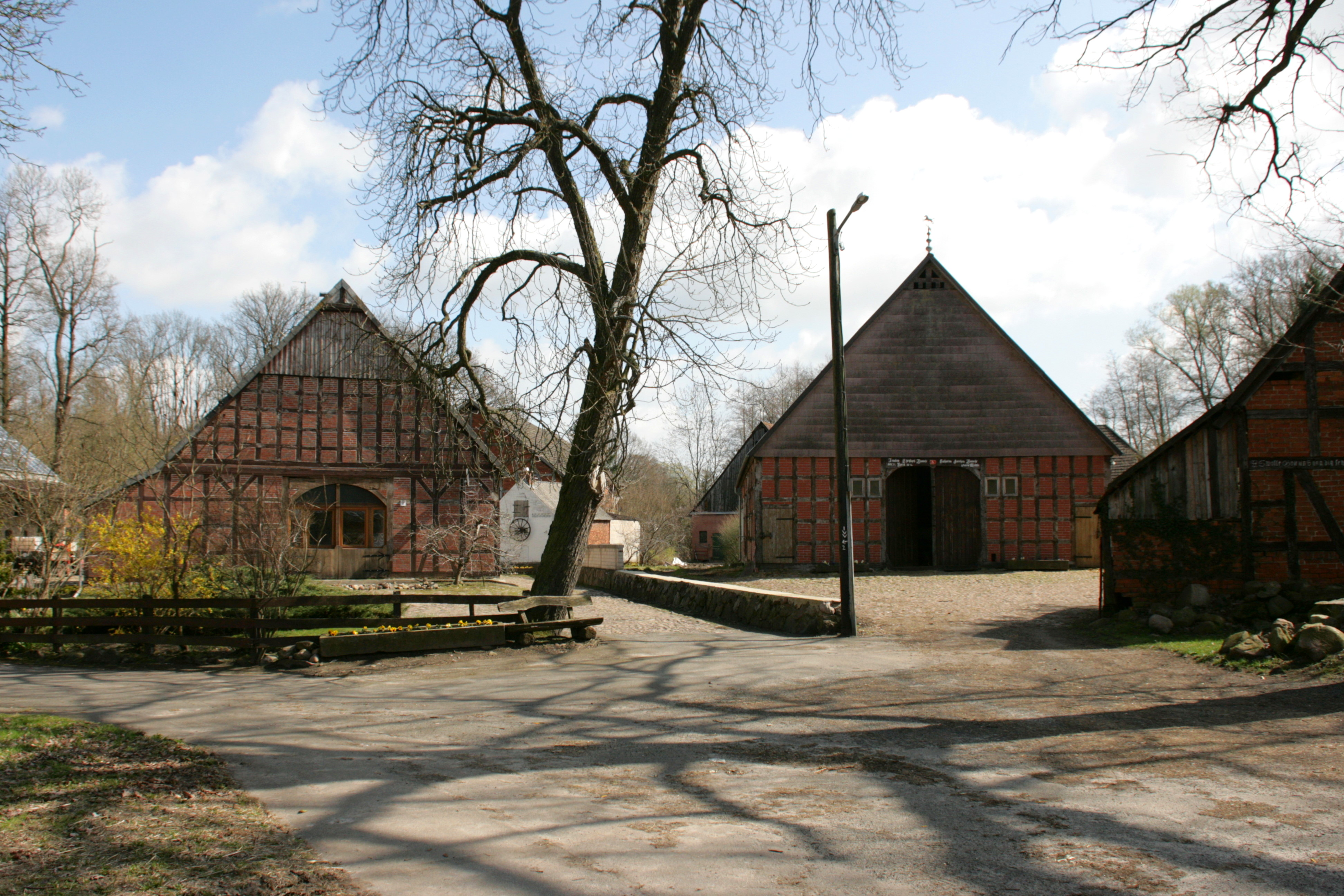 Jiggel, Bergen an der Dumme